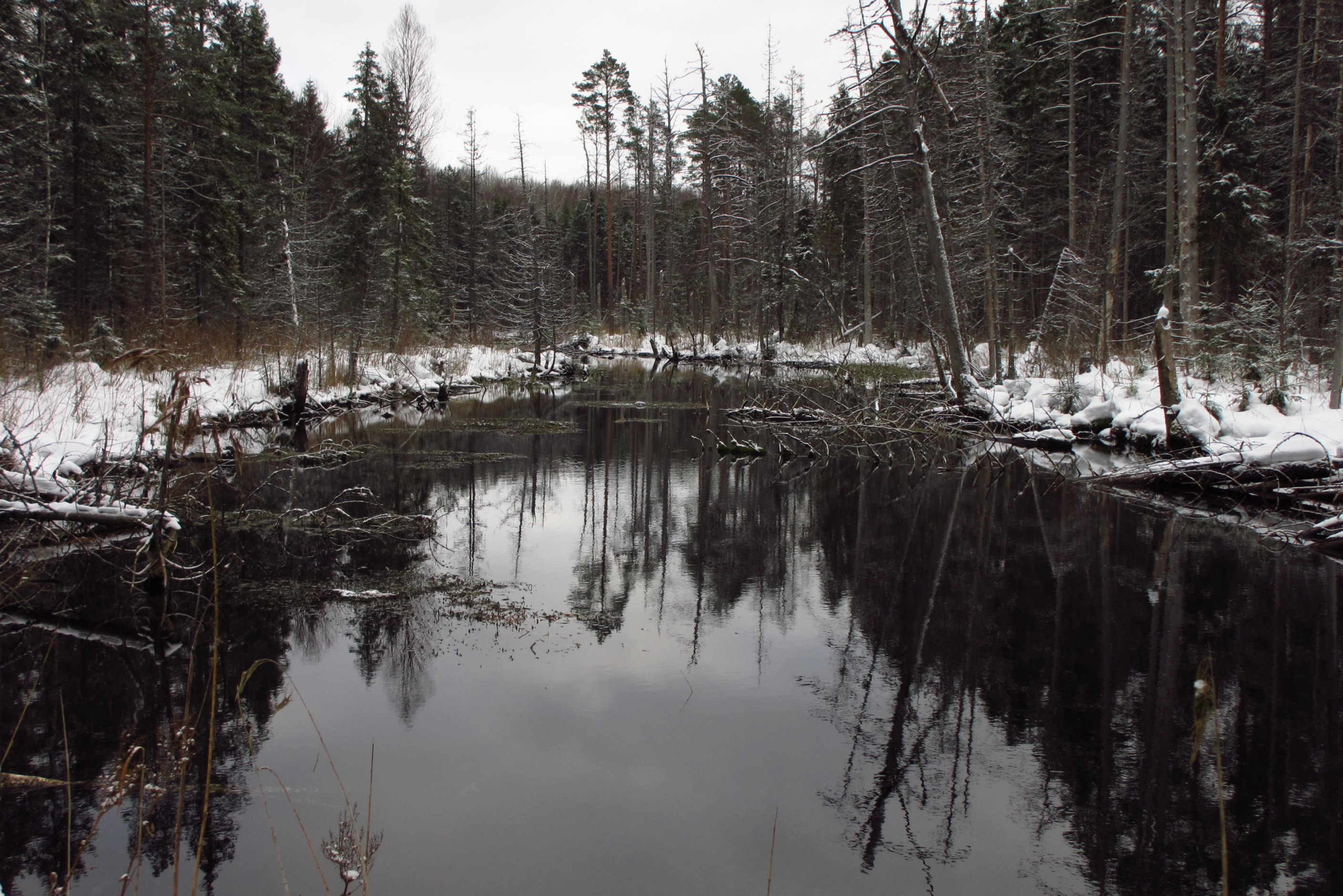 Võlingi jõgi Vilbaste allikate juures